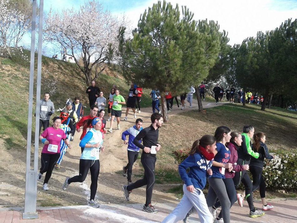 Corredores de la segunda edición de Corro Contra el Càncer